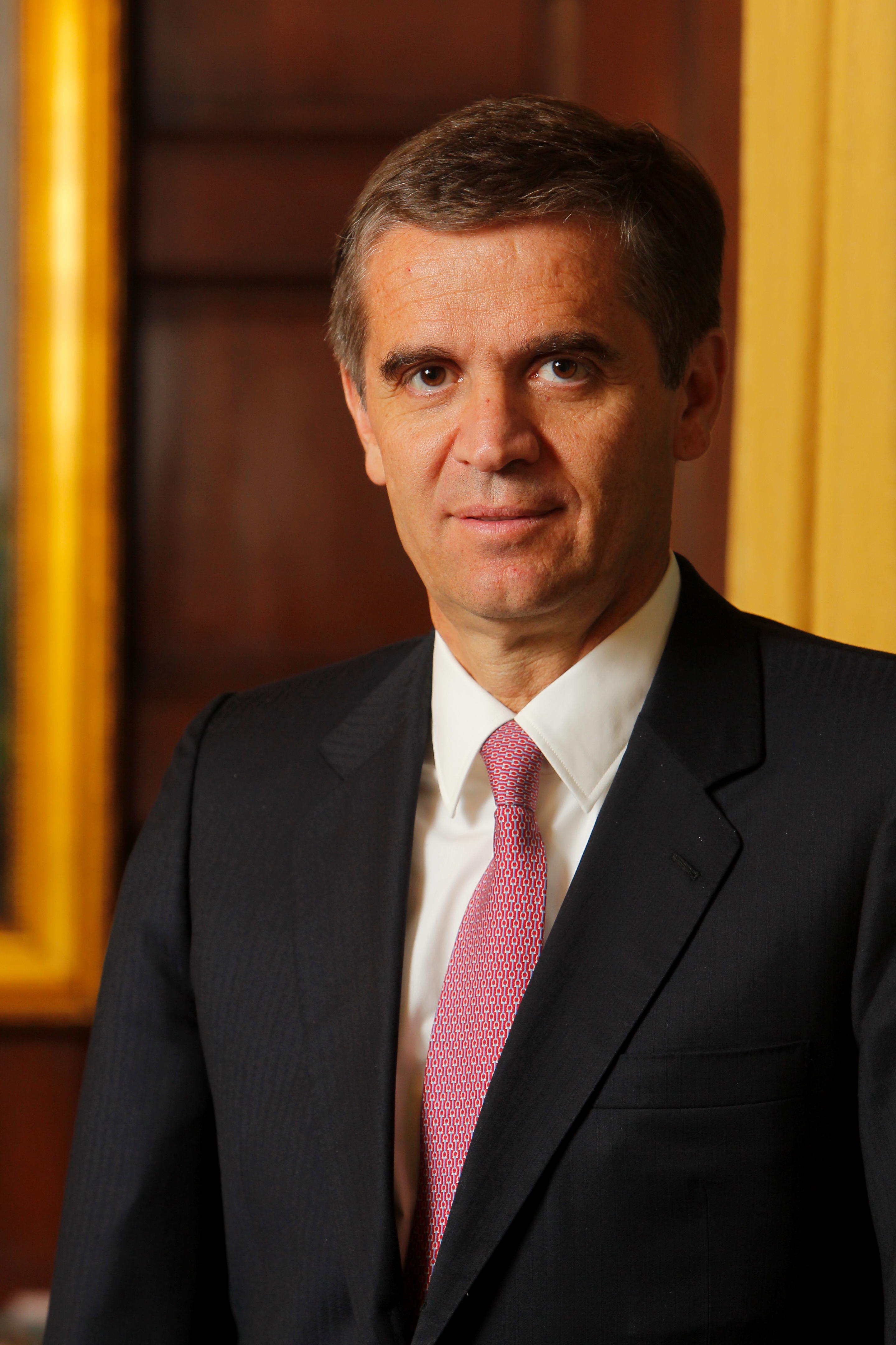 Presidente del Banco Central de Chile